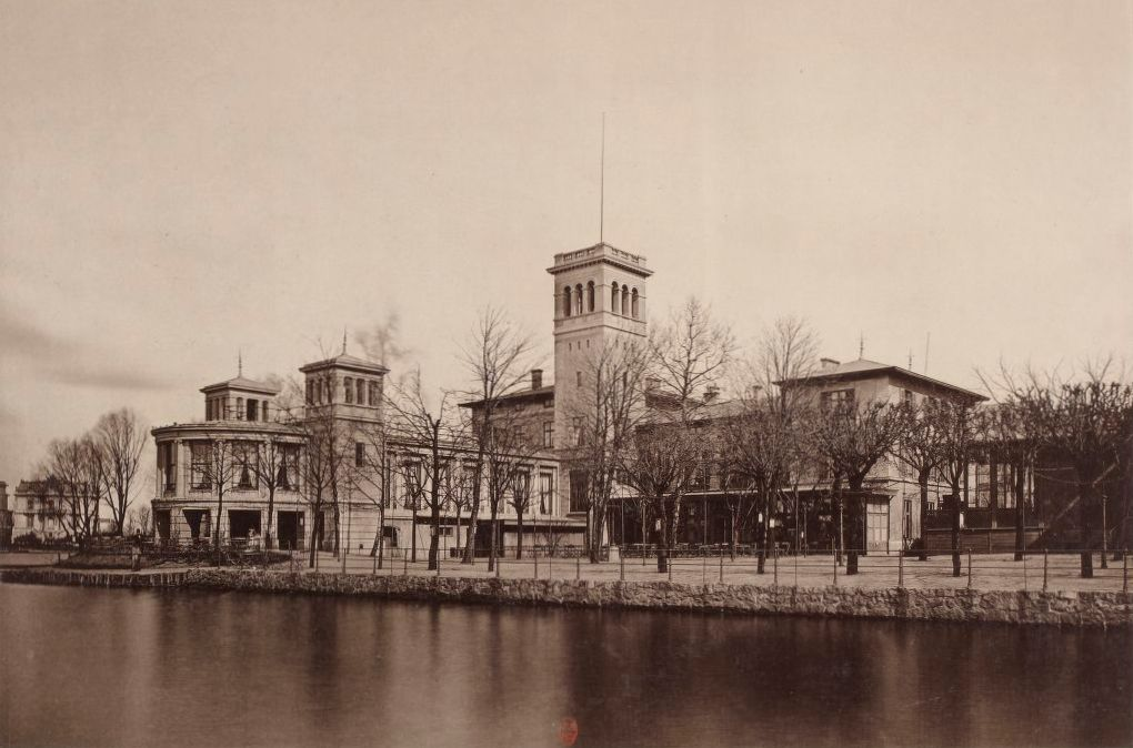 Hamburg, Historische Photographie (1890er)